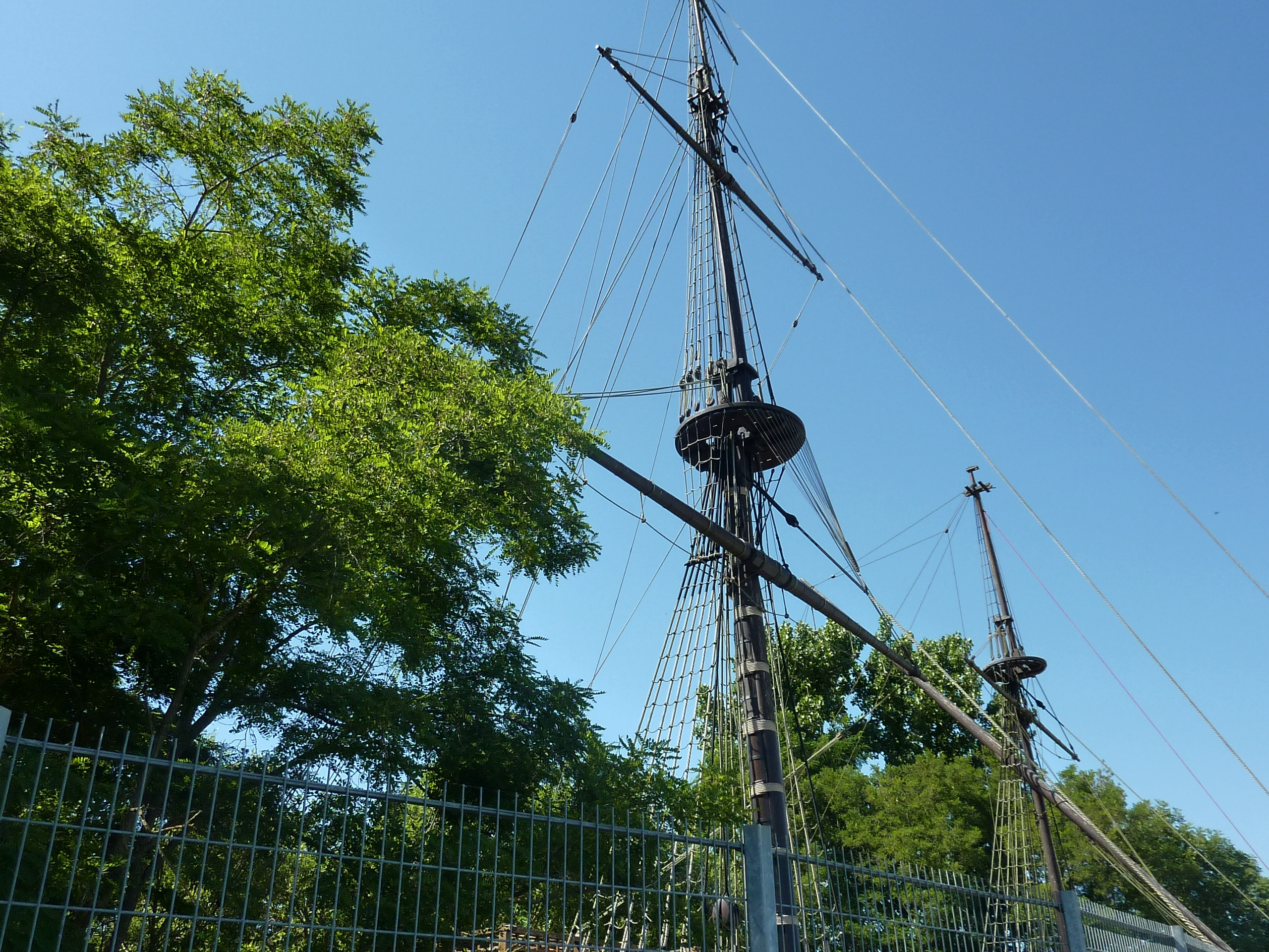 Aire des gréements Corderie royale Rochefort Charente-Maritime France